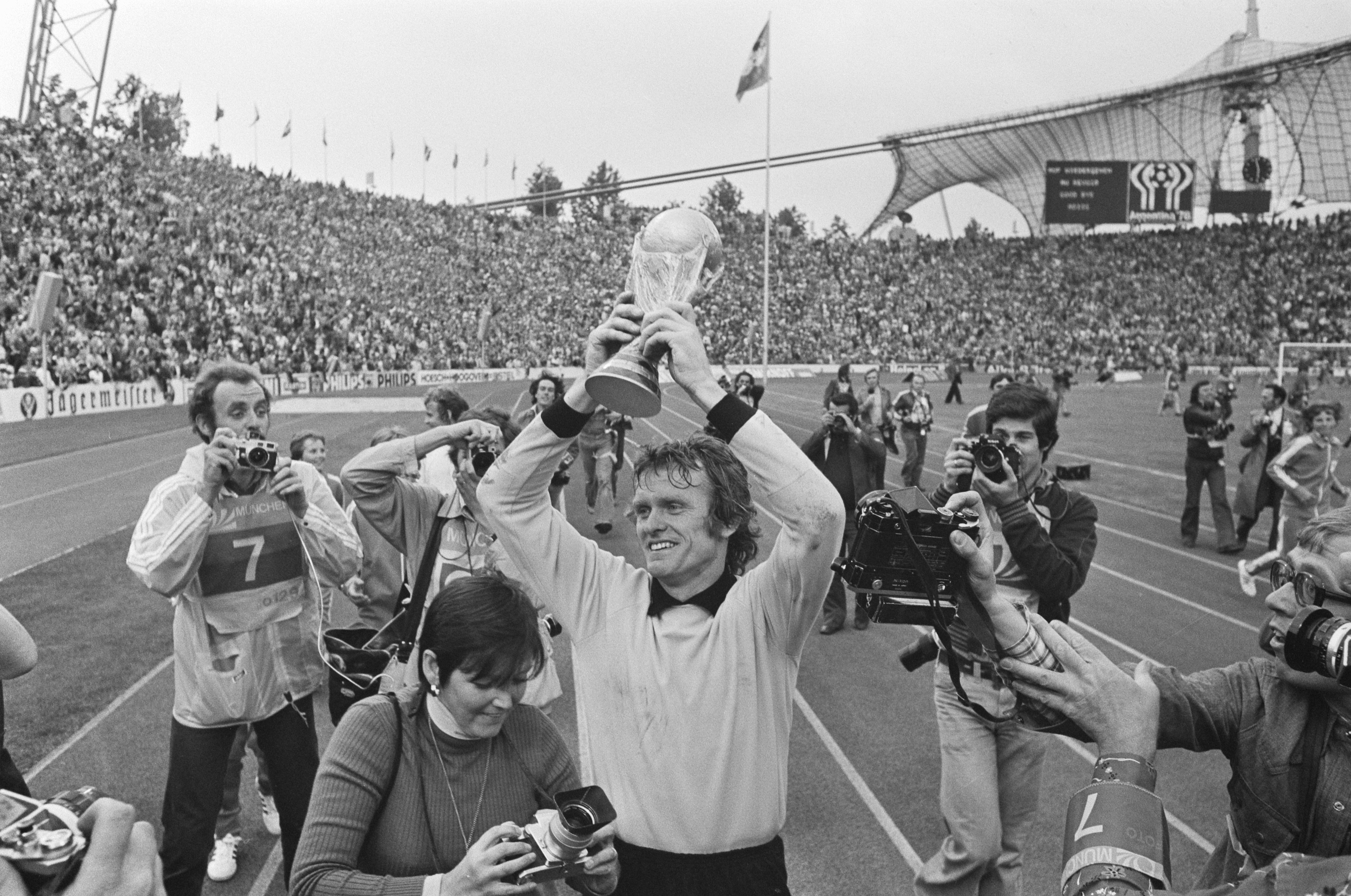 Collectie / Archief : Fotocollectie Anefo Reportage / Serie : [ onbekend ] Beschrijving : Finale wereldkampioenschap voetbal 1974 in Munchen, West Duitsland tegen Nederland 2-1; keeper Sepp Maier met de beker Datum : 7 juli 1974 Locatie : München, Nederland, West-Duitsland Trefwoorden : bekers, finales, keepers, sport, voetbal, wereldkampioenschappen Persoonsnaam : Maier, Sepp Fotograaf : Verhoeff, Bert / Anefo Auteursrechthebbende : Nationaal Archief Materiaalsoort : Negatief (zwart/wit) Nummer archiefinventaris : bekijk toegang 2.24.01.05 Bestanddeelnummer : 927-3107